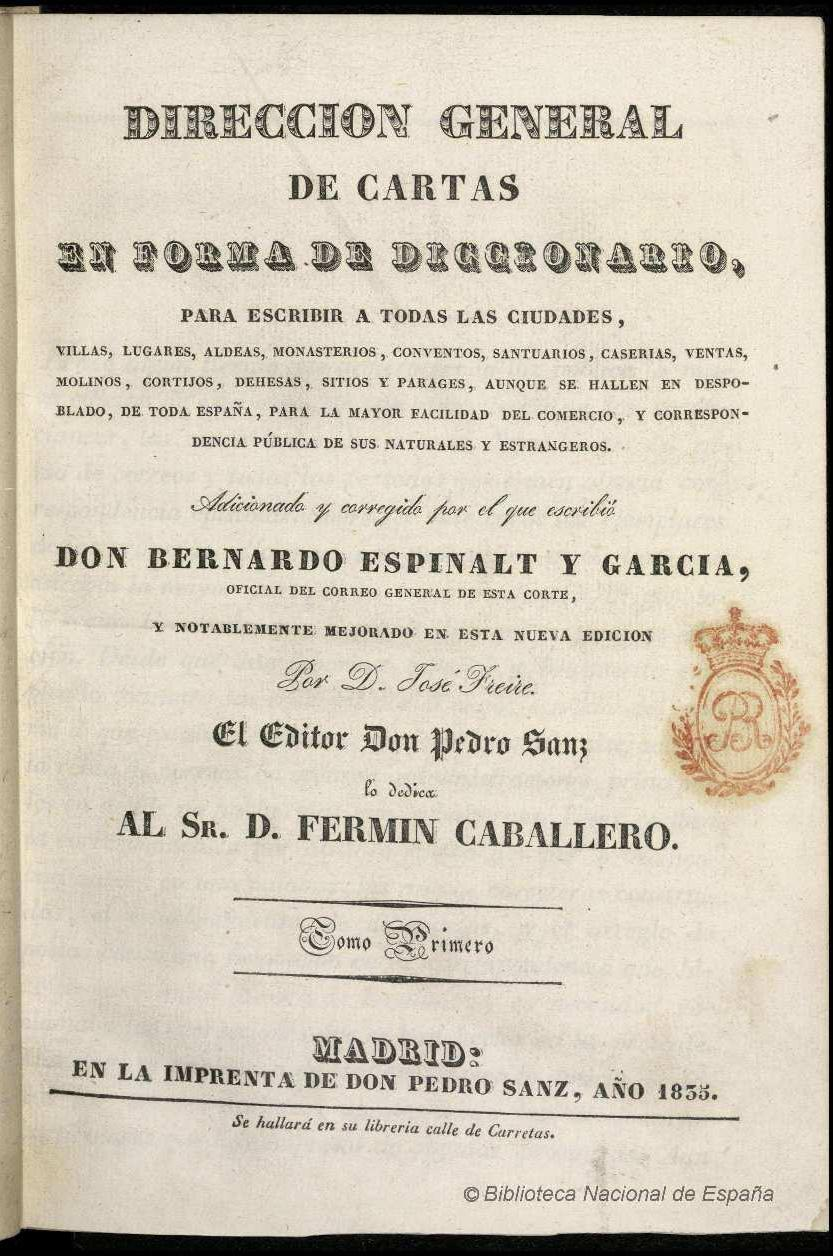 Dirección general de cartas, en forma de diccionario, para escribir a todas las ciudades ... de toda España ... adicionado y corregido por el que escribió Bernardo Espinalt y Garcia ... y notablemente mejorado en esta nueva edición por José Freire Autores: Espinalt y García, Bernardo ; Freire, José Fecha: 1835 Datos de edición: [S.l.] [s.n.] Madrid En la Imprenta de Don Pedro Sanz